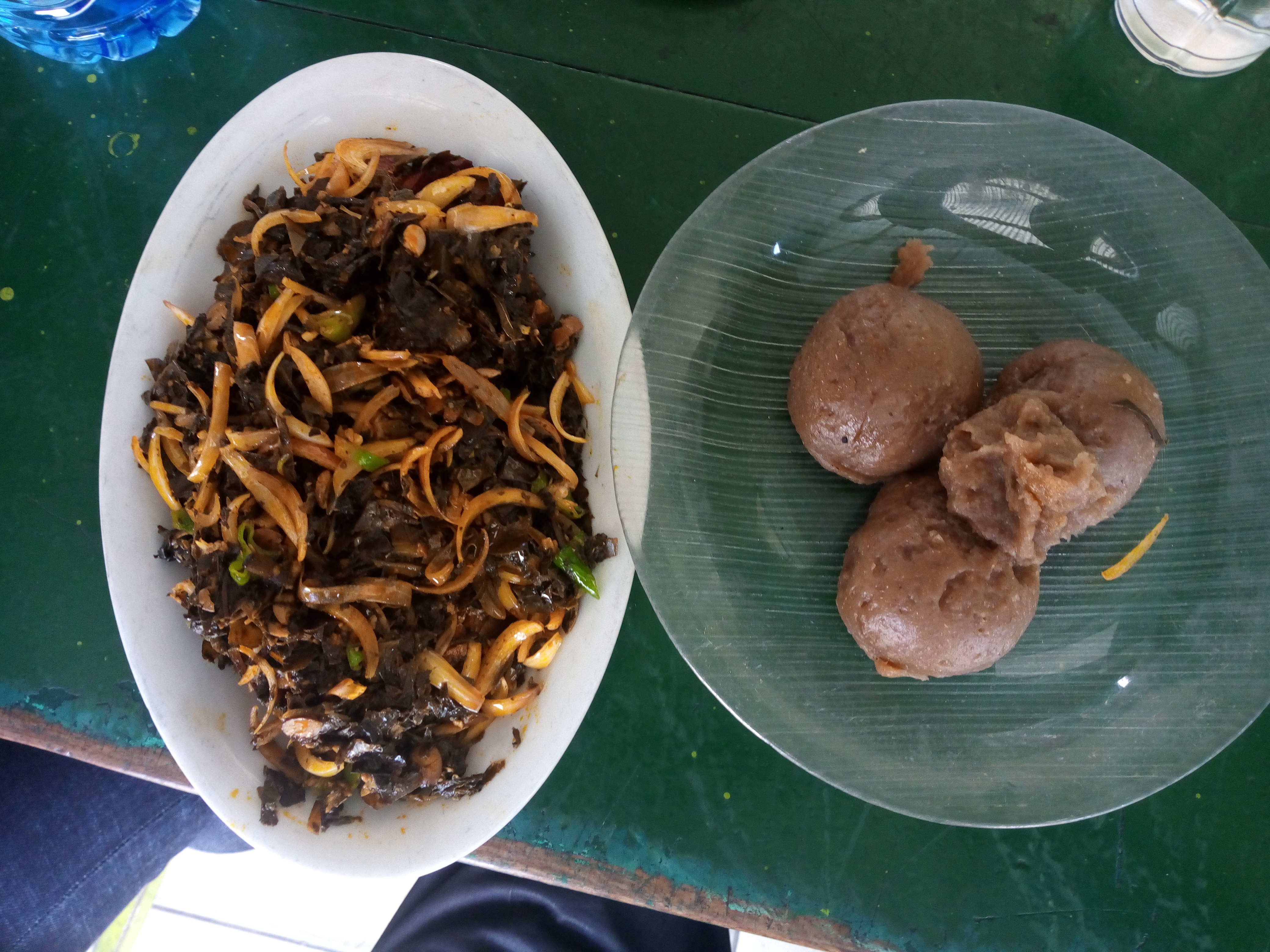 Plate de Pâte noire au légumes au Benin